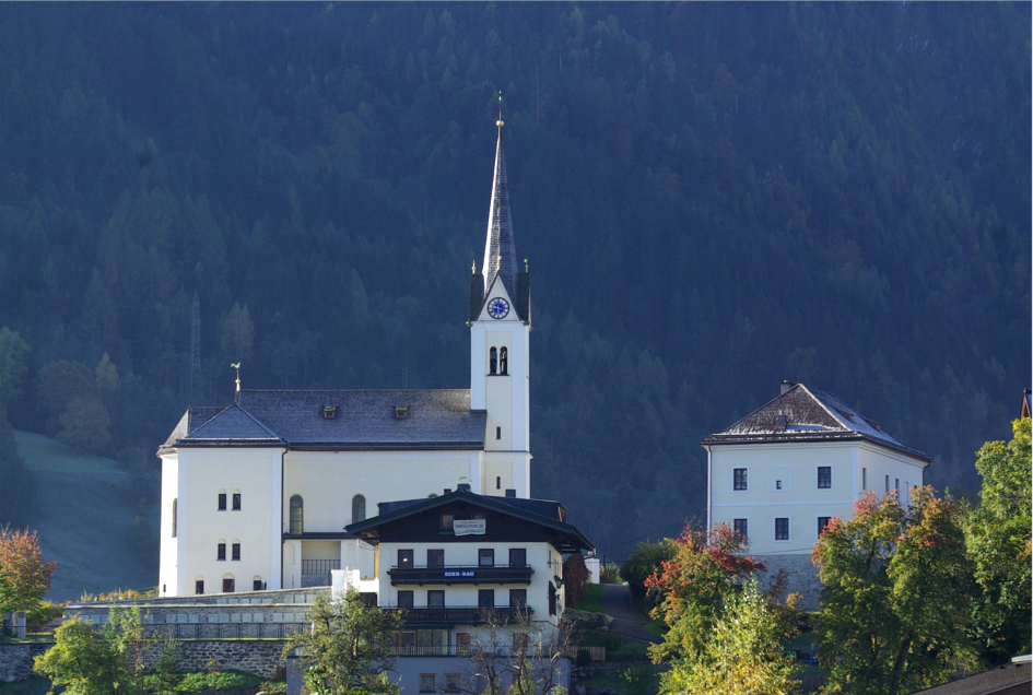 Kath. Pfarrkirche hl. Margarethe und der "Kirch-Friedhof". Rechts im Bild der Pfarrhof.